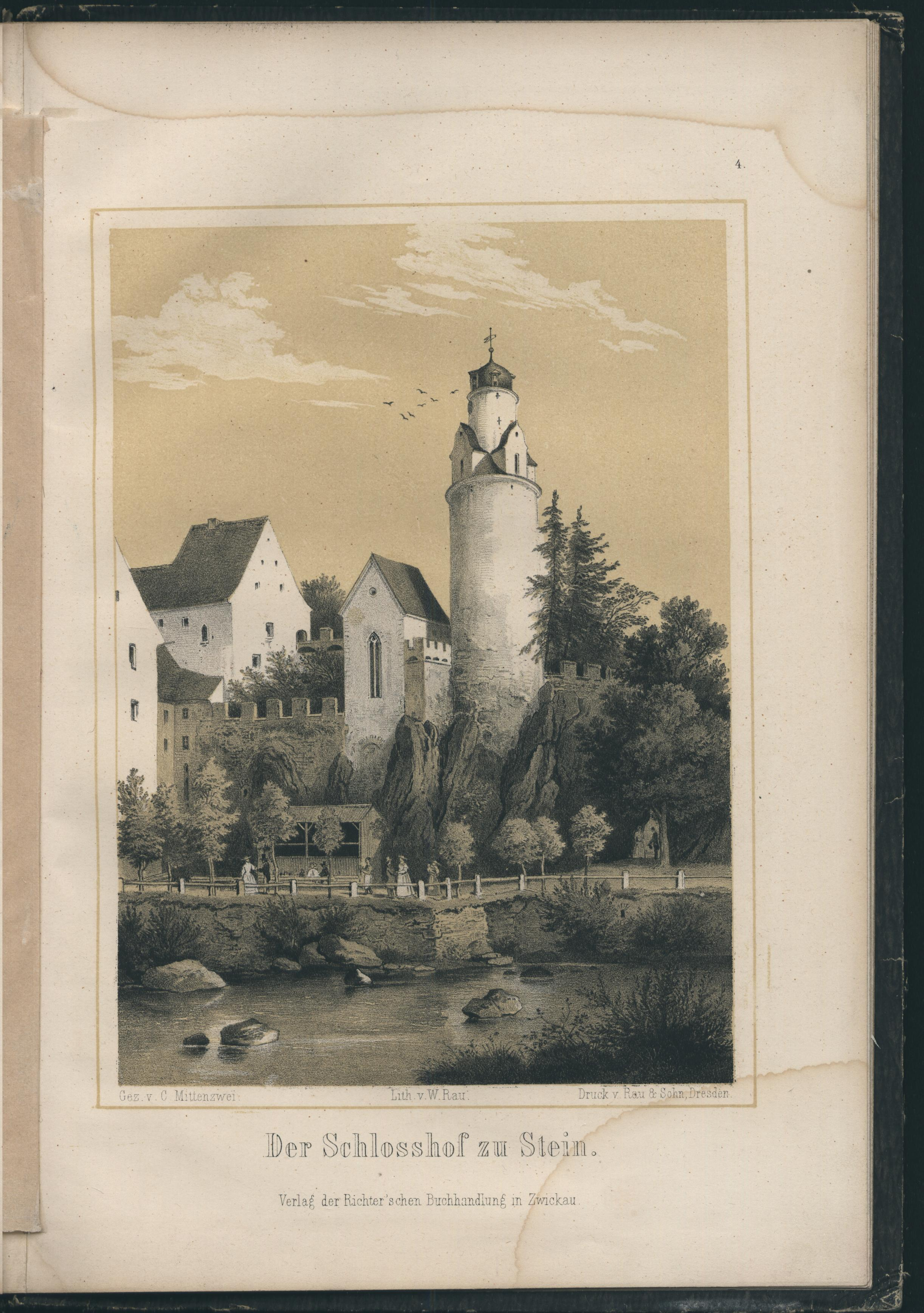 Seite aus: Album der Obererzgebirgischen Staats-Eisenbahn